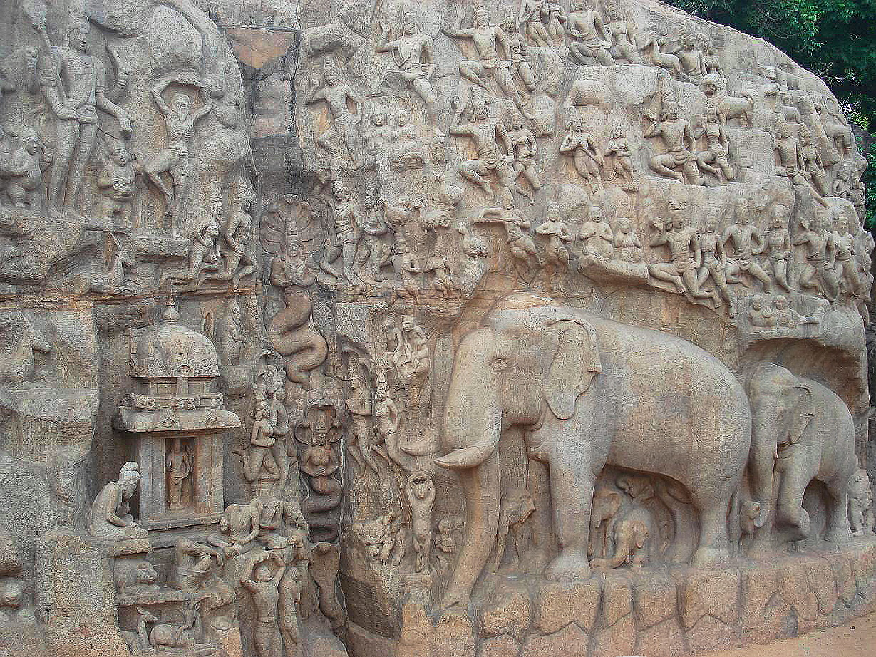 Arjun penance Sculptures in Mahabalipuram